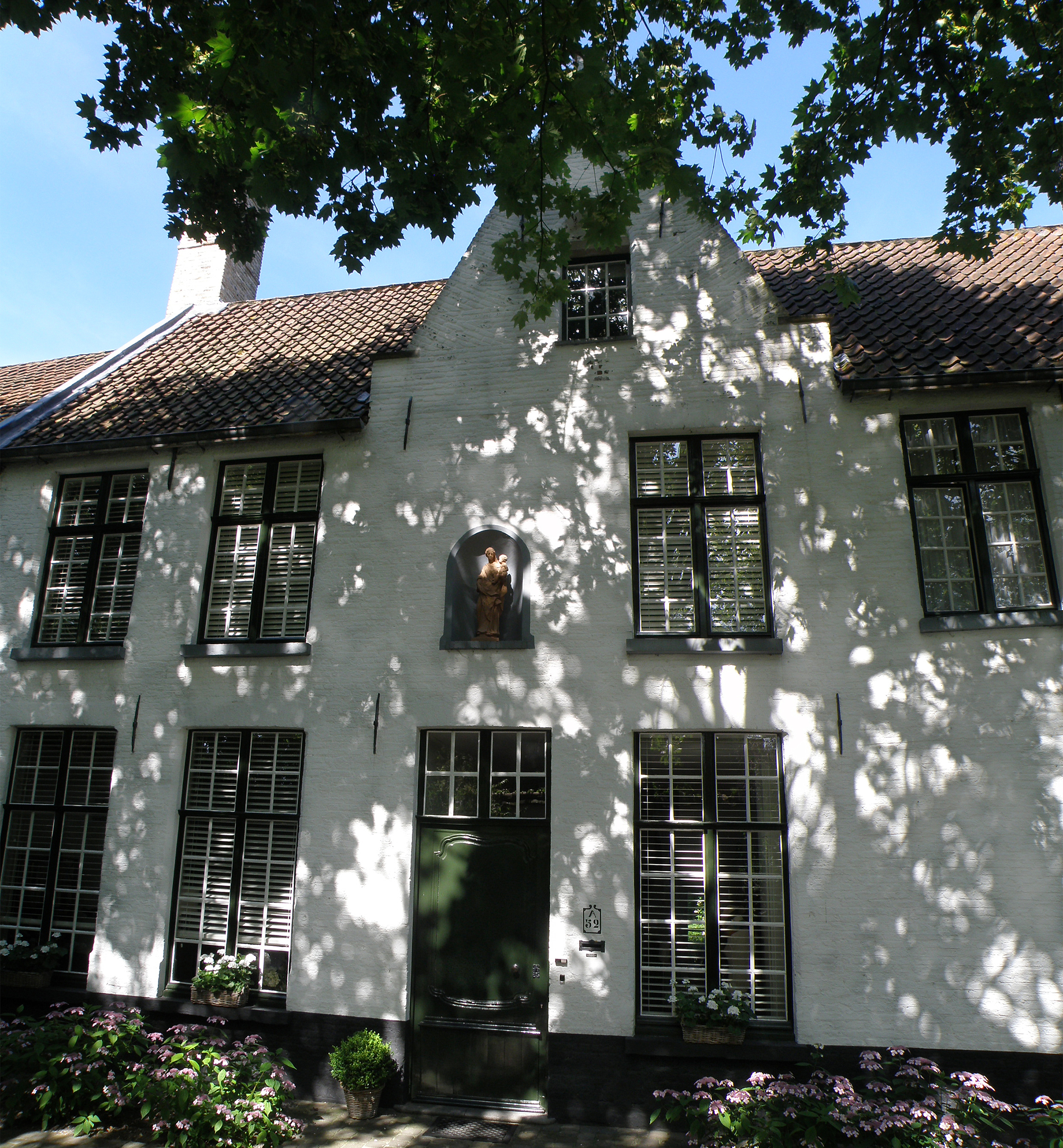 Brugge, Begijnhof. Begijnenhuis nr. 52.